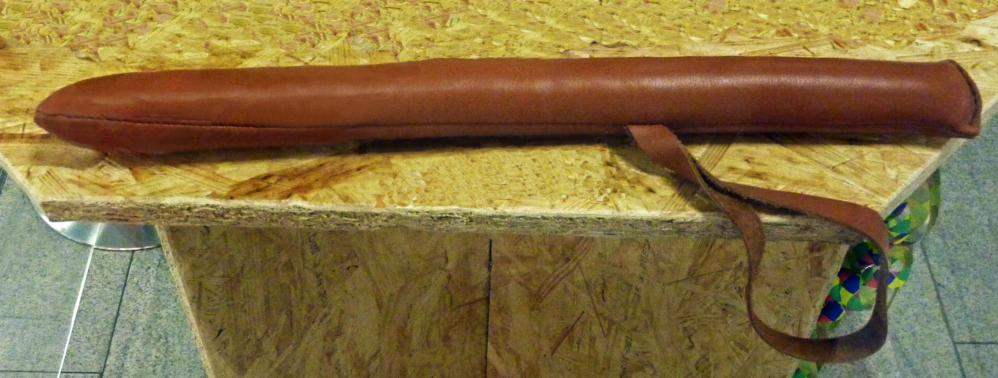 Sandwurst (Narrenwurst) - Häsrequisit oder Narrenutensil des Fuchswadels, einer Hauptfigur der Schömberger Fasnet. Exponat aus der Sammlung Peter Scharte aus der Ortenau, vom 14. Januar bis 13. Februar 2013 im Einkaufszentrum Schwarzwald City (Freiburg) unter dem Titel „Narrenrequisiten - vielfältig und kreativ“ ausgestellt. Date 29 January 2013